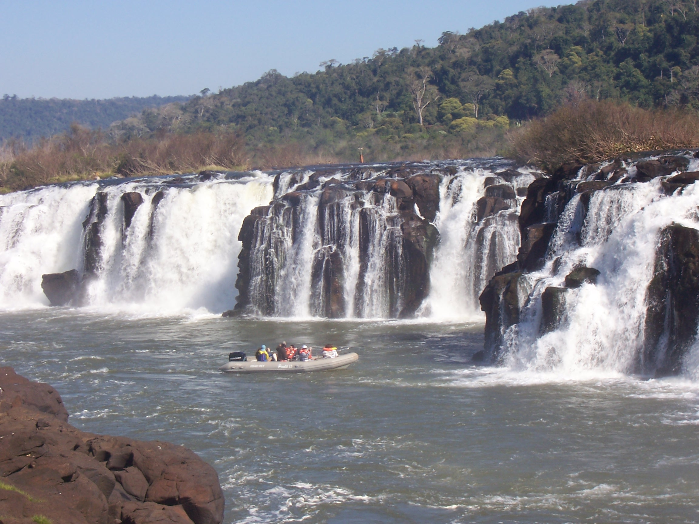 Los Saltos del Moconá o Yucumã sobre el río Uruguay en la frontera argentino-brasileña, con una extensión de casi dos mil metros.